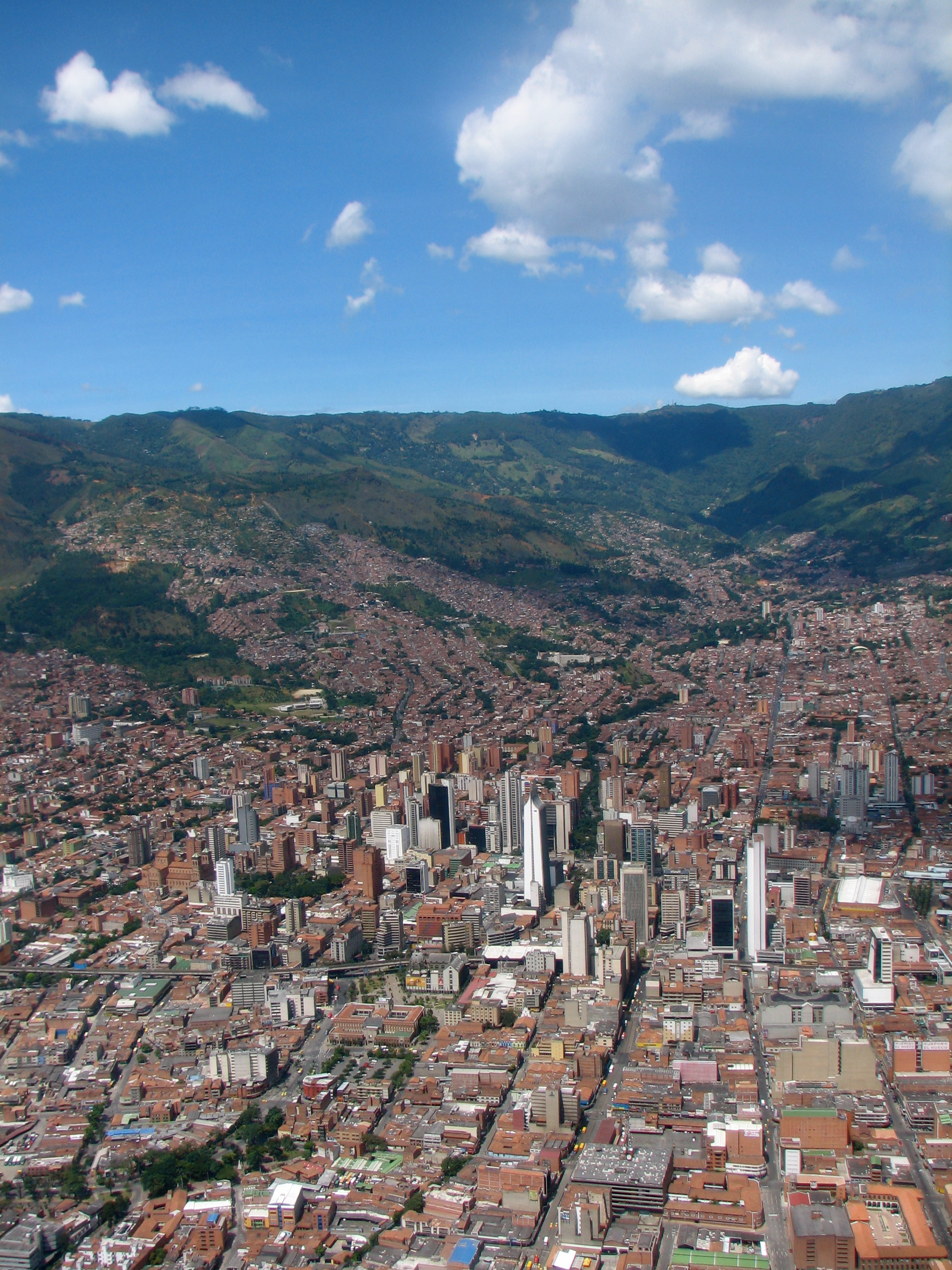 centro de la ciudad de Medellín. Colombia.